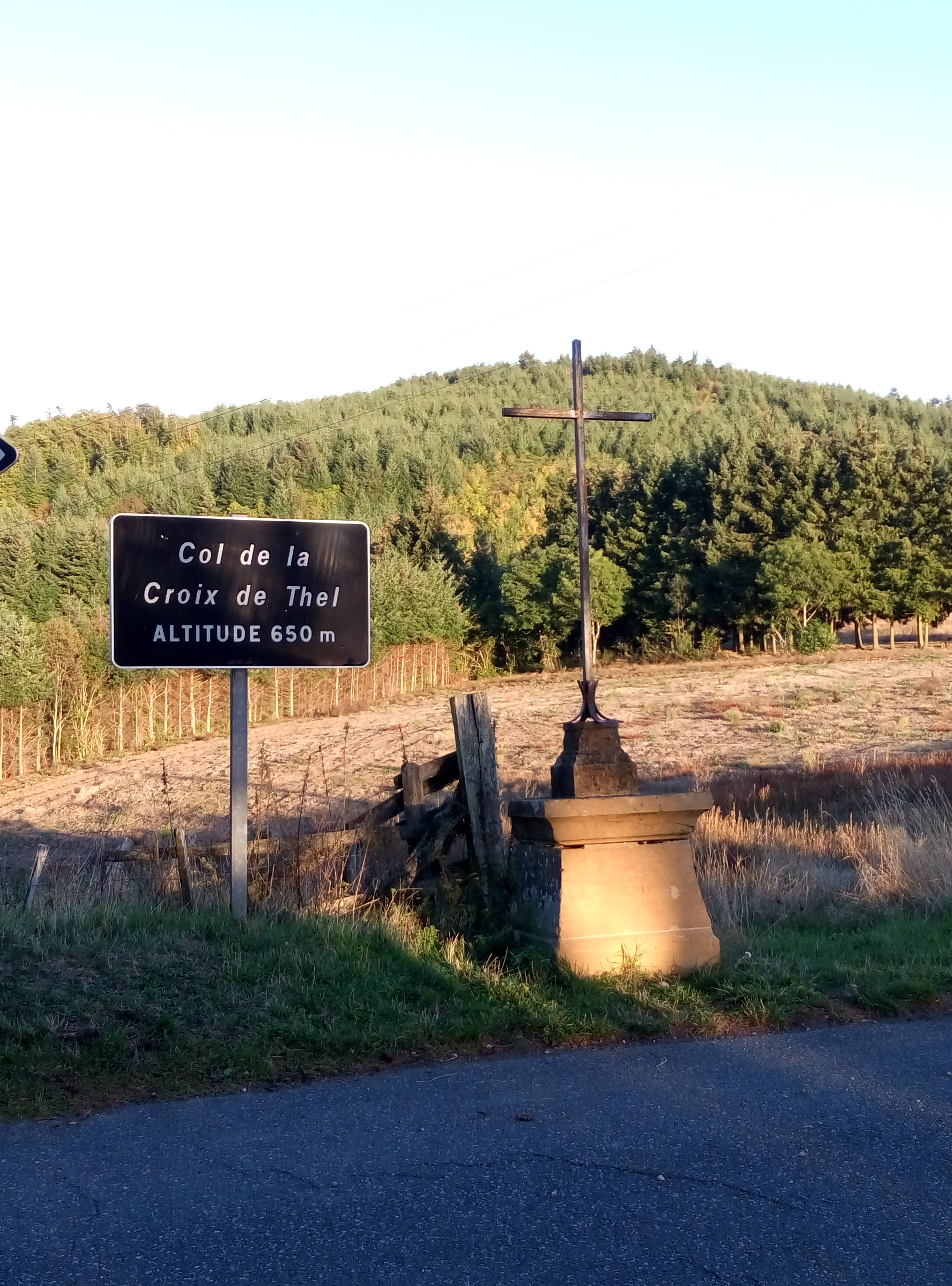 Col de la Croix de Thel : panneau et croix.